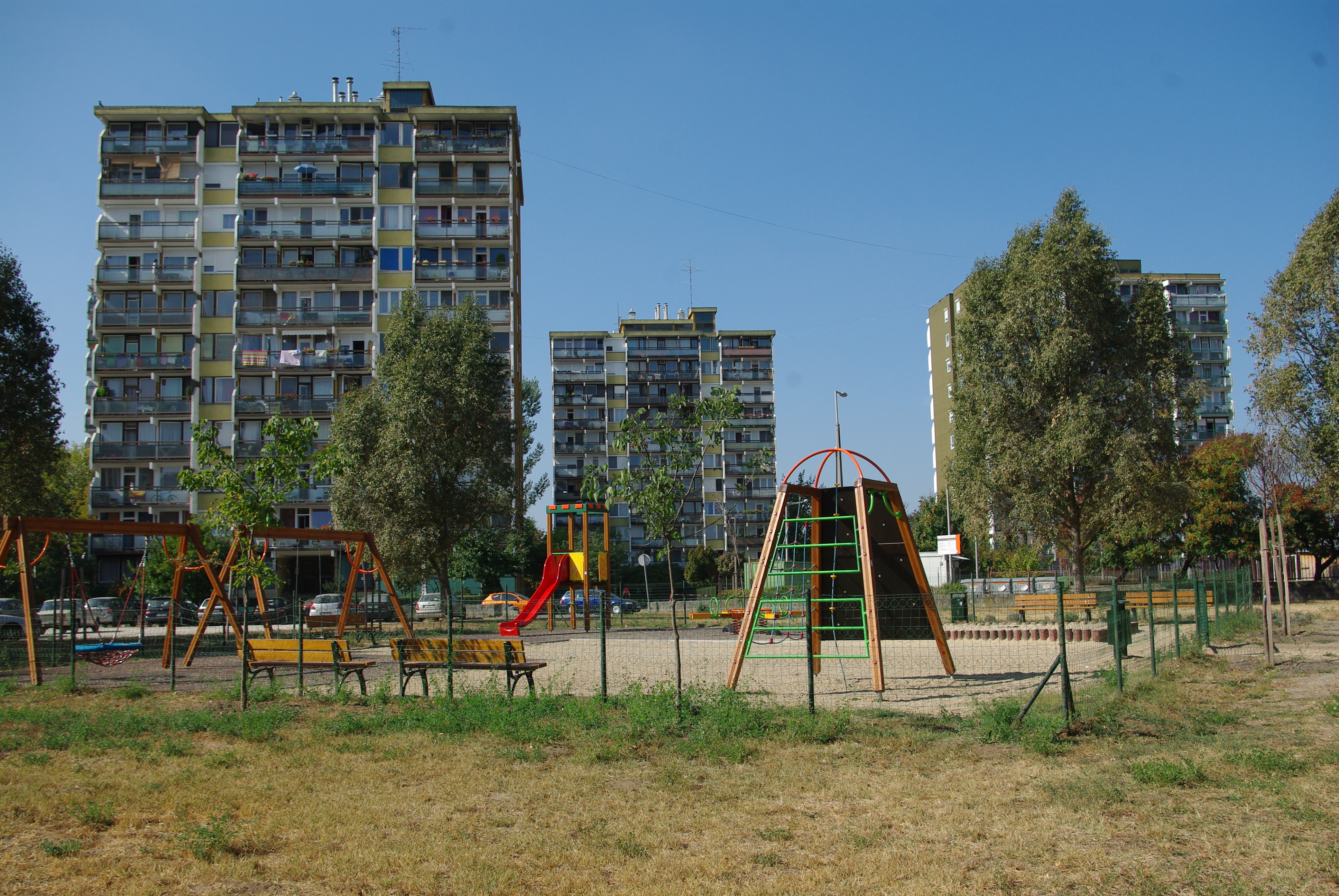 Izzó lakótelep, Erdősor utcai lakóházak (Budapest IV. ker.)